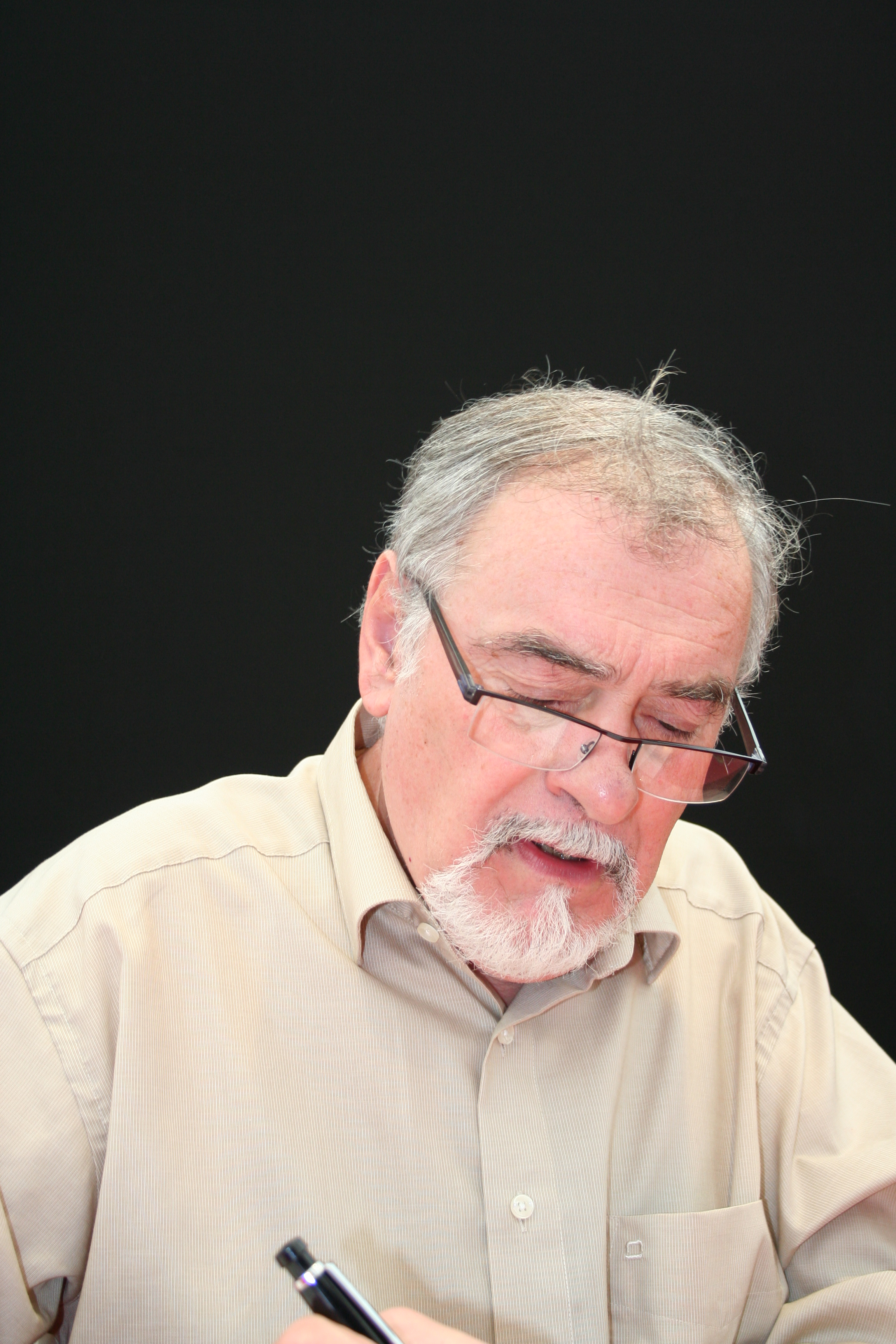 auteur de bande dessinée, lors du salon Quai des Bulles à Saint-Malo, France, en octobre 2008